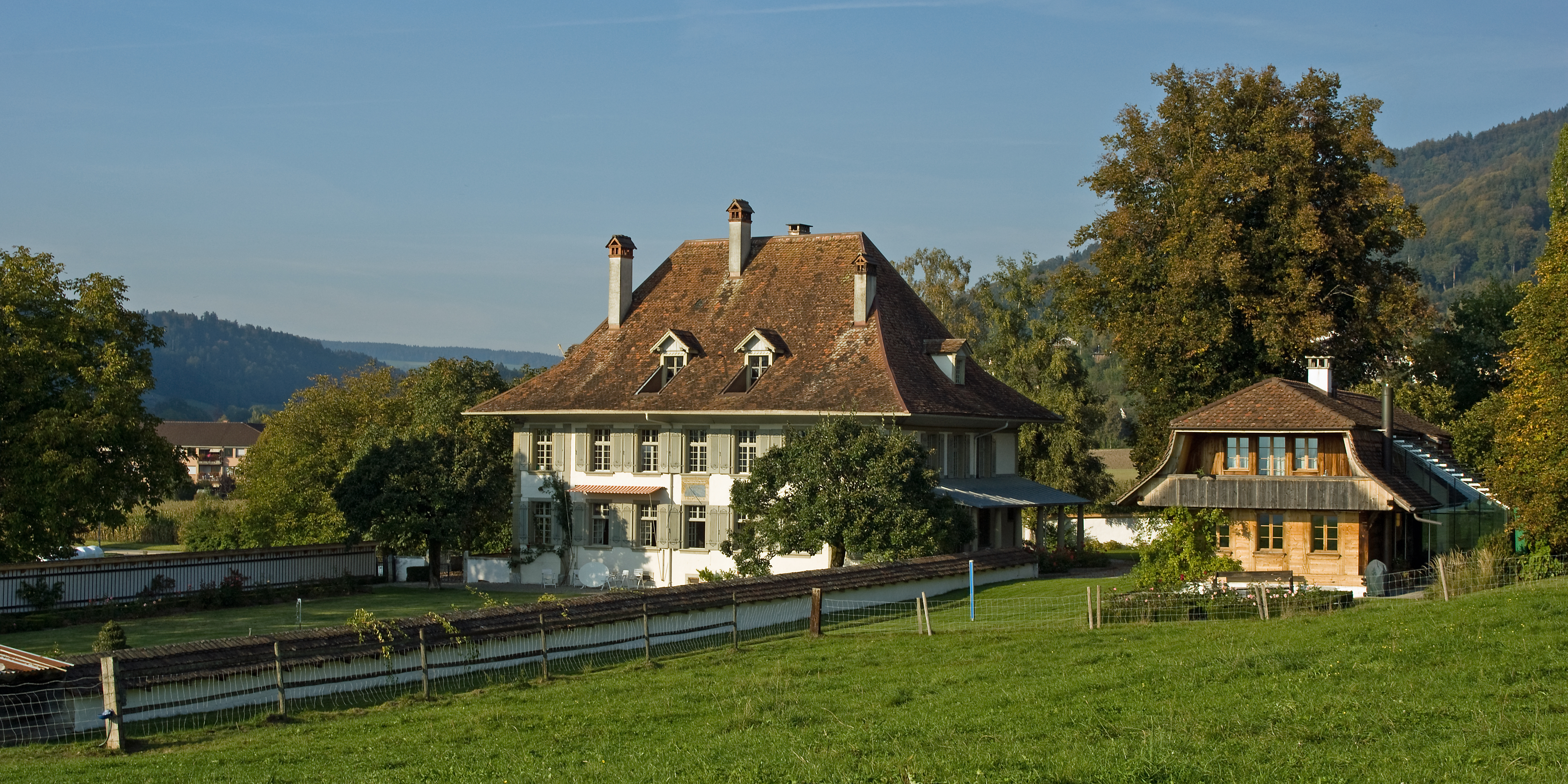 Oberdiessbach BE, Landsitz Diessenhof mit Stöckli (Nebengebäude)